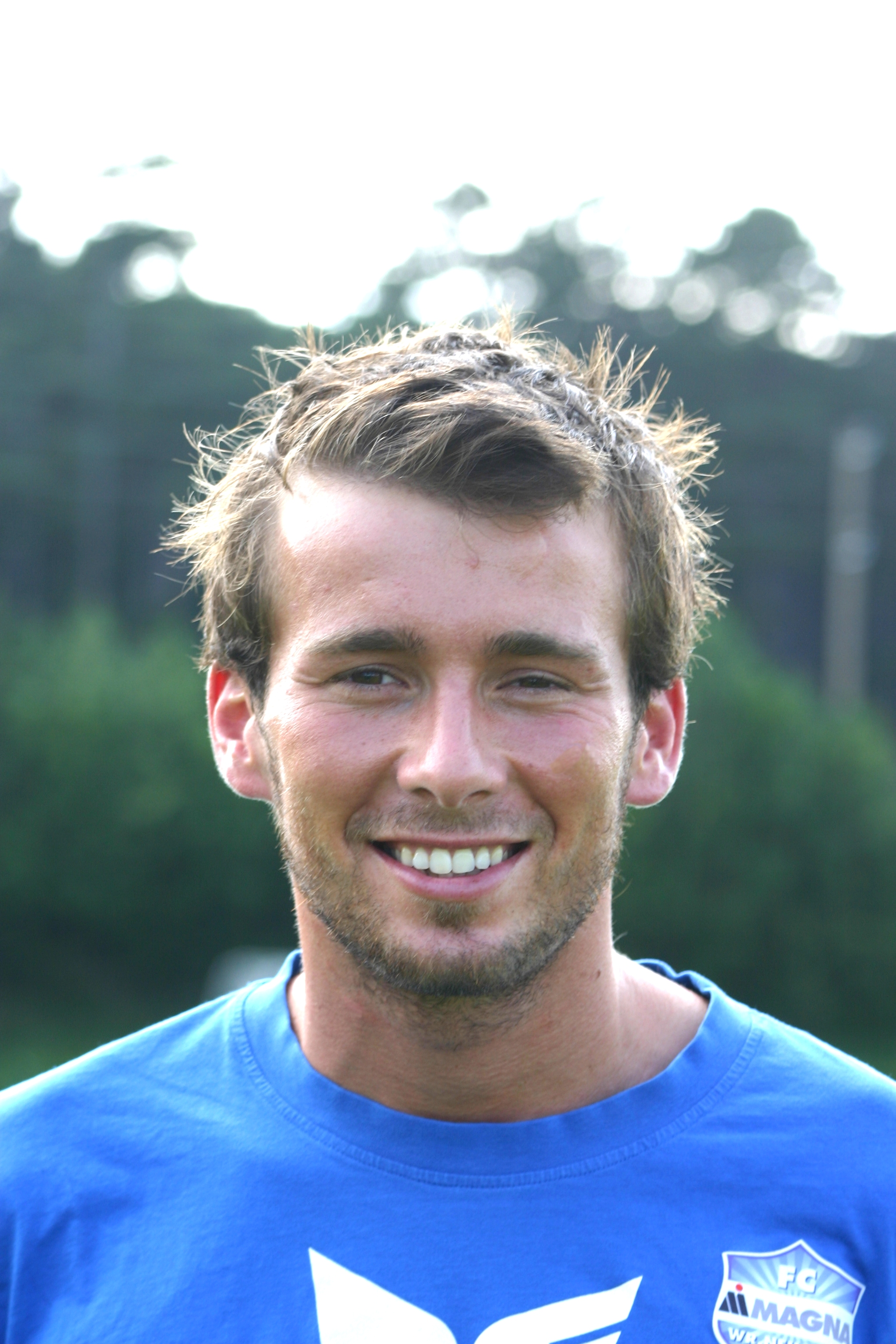 Mario Reiter (FC Magna Wiener Neustadt)